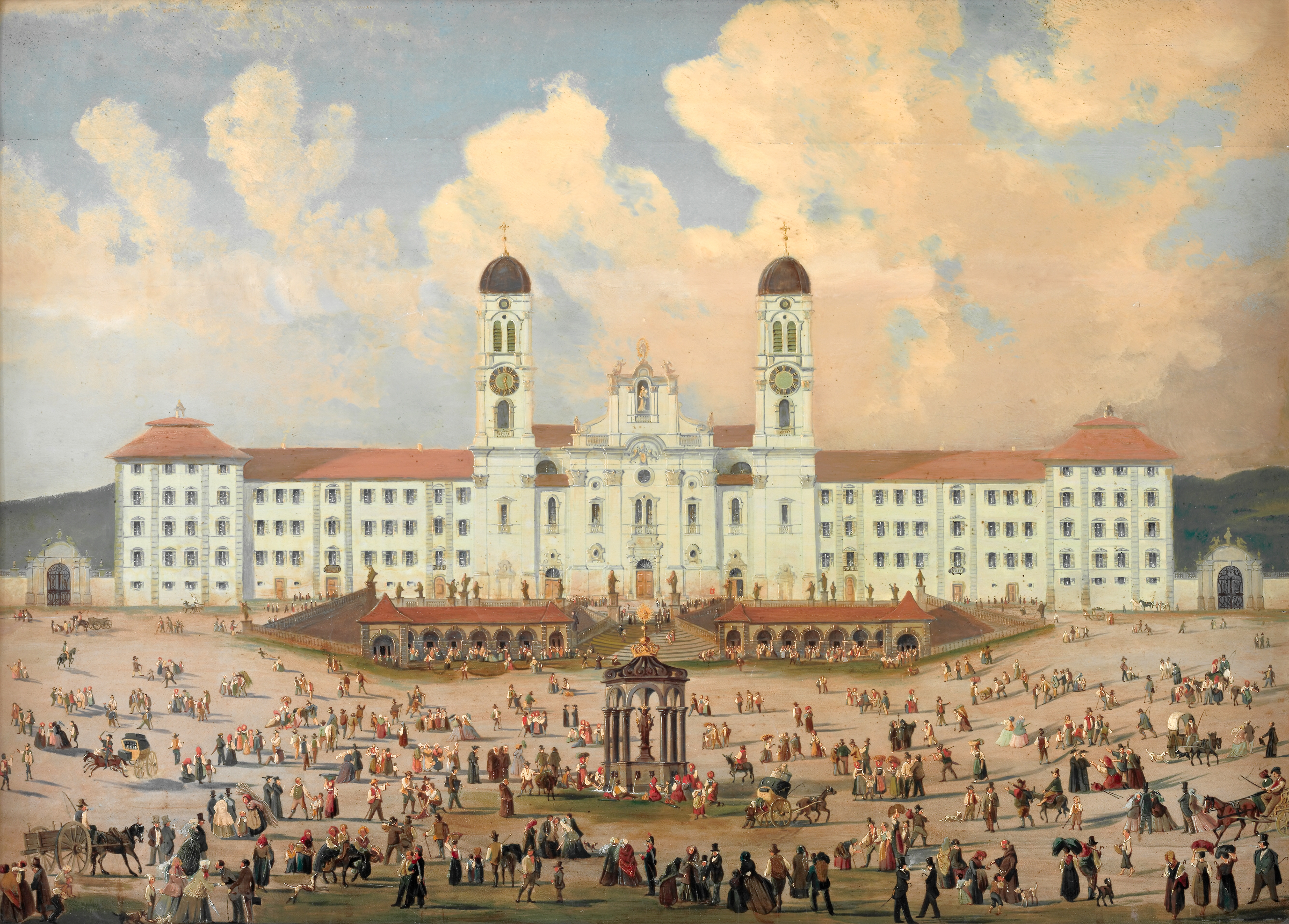 Das Kloster Einsiedeln um 1840/1850. Öl auf Holz. Kloster Einsiedeln, Kunstsammlung